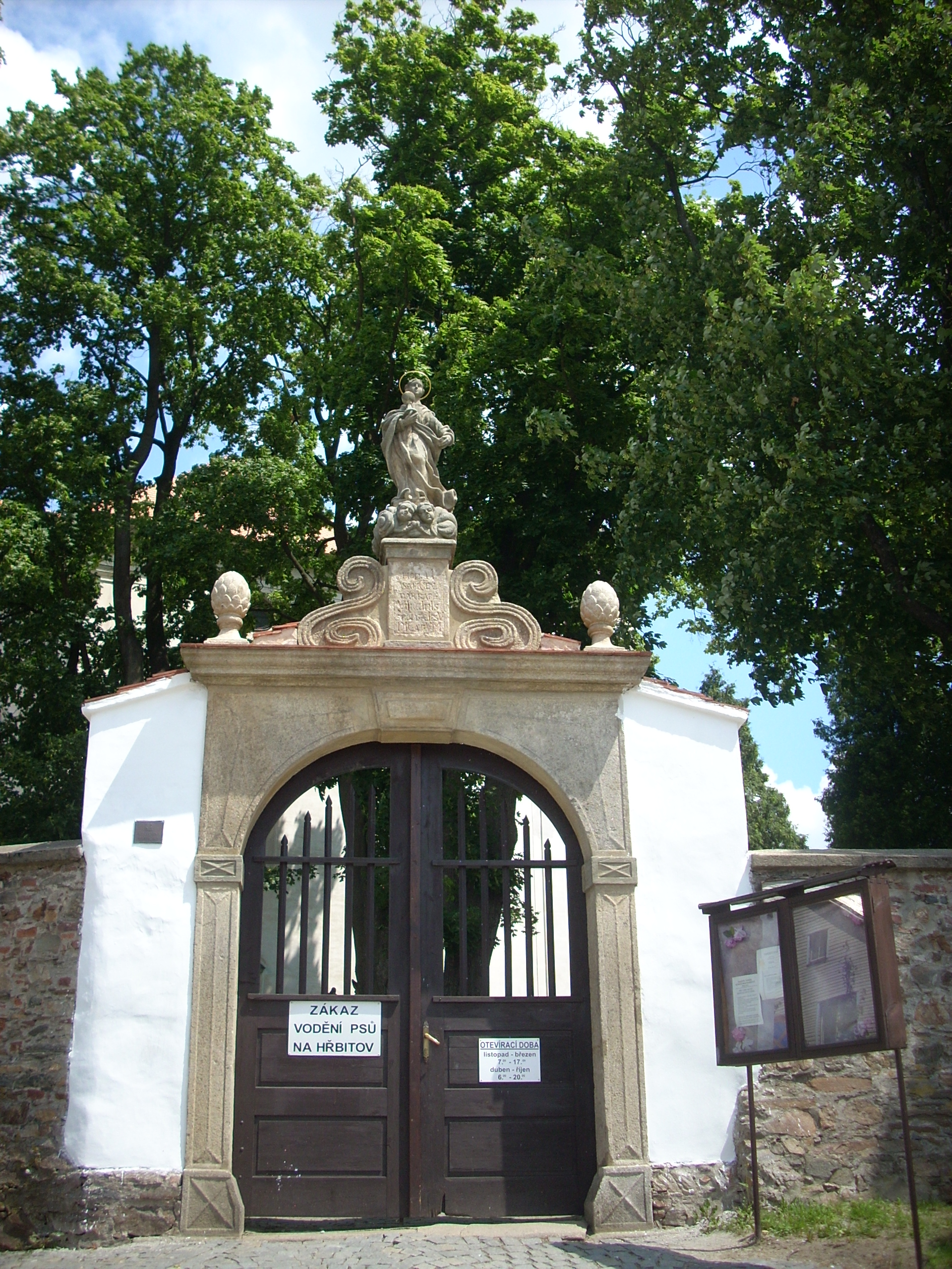 Polná - kostel svaté Barbory - brána